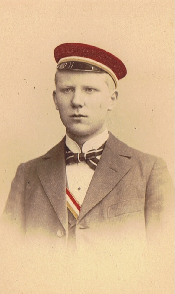 Porträtfotografie von Kurt Glaser als Mitglied des Corps Starkenburgia Gießen